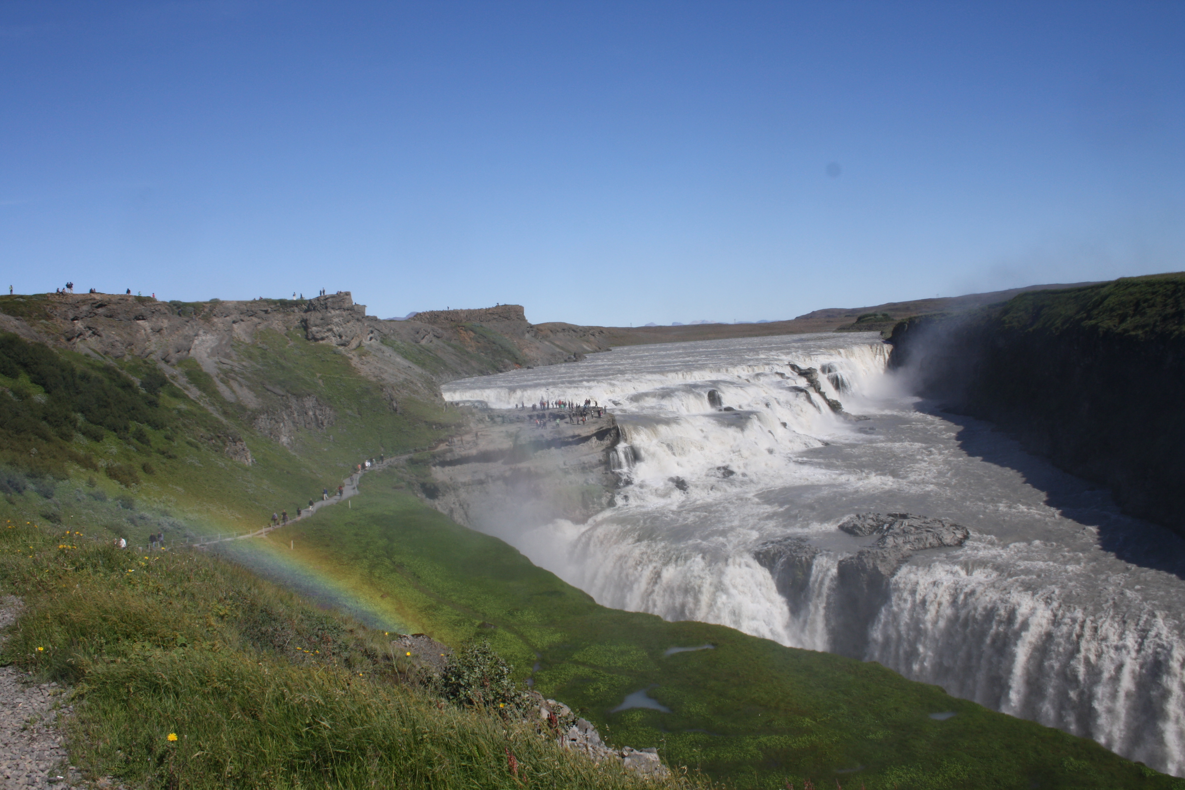 Gullfoss